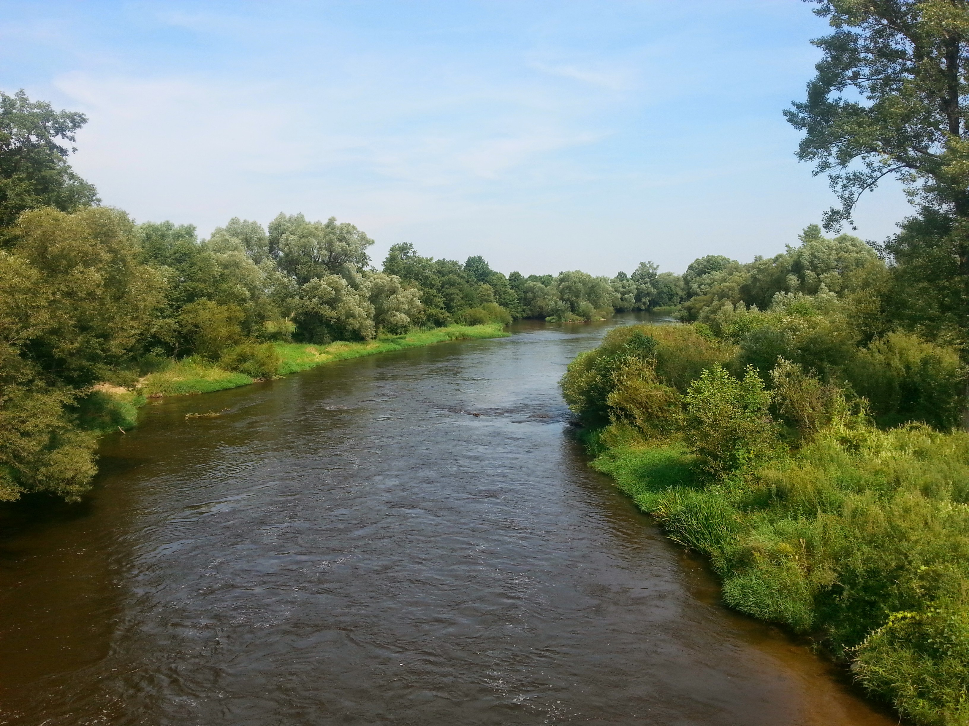 Warta - widok z mostu w Rychłocicach